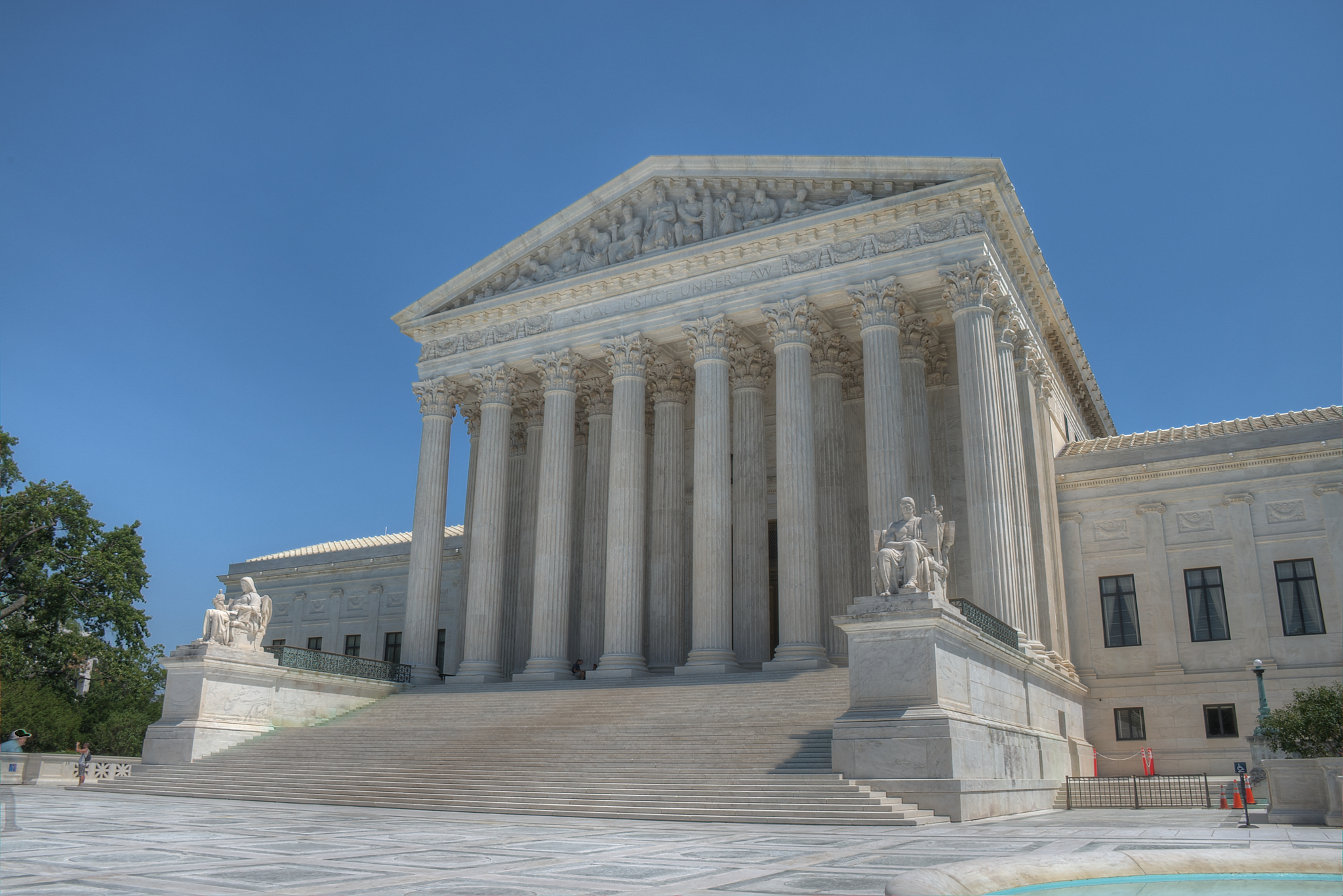 15-23-0154: Supreme Court